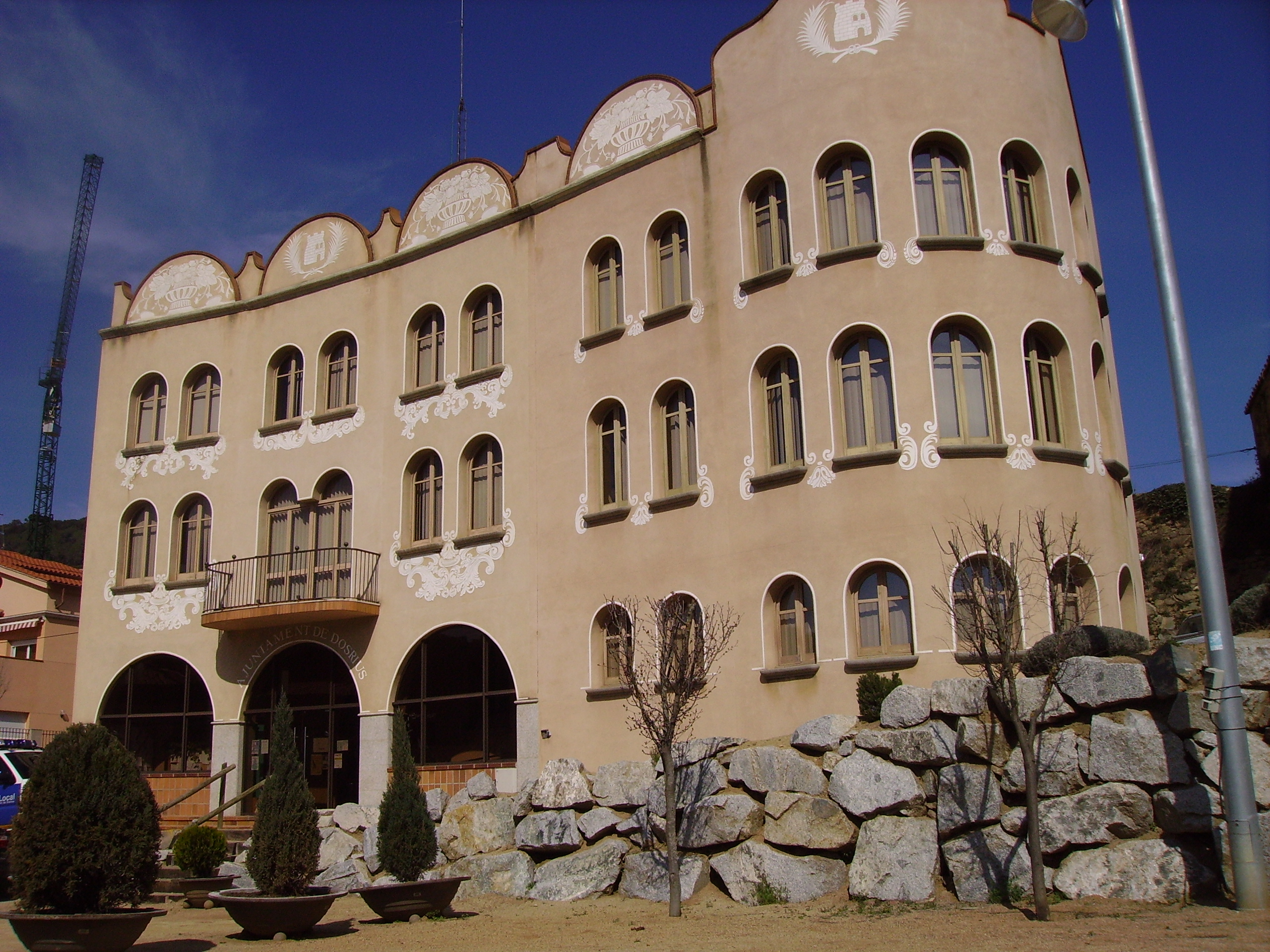 Ajuntament de Dosrius, El Maresme, Catalunya.